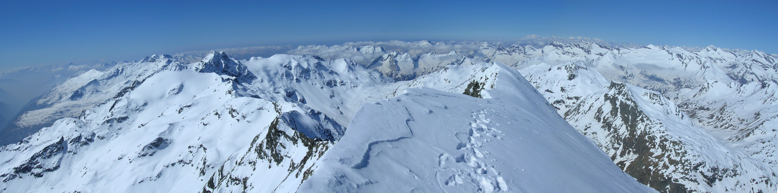 Panoramablick vom Pizzo Tambo